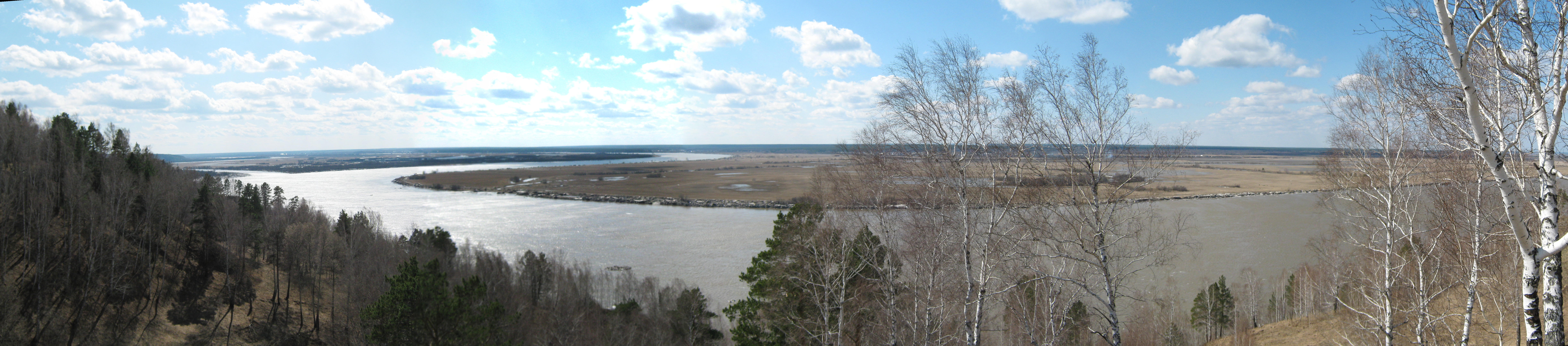 Томь за Аникино This image is related to the protected area of Russia number 7010236